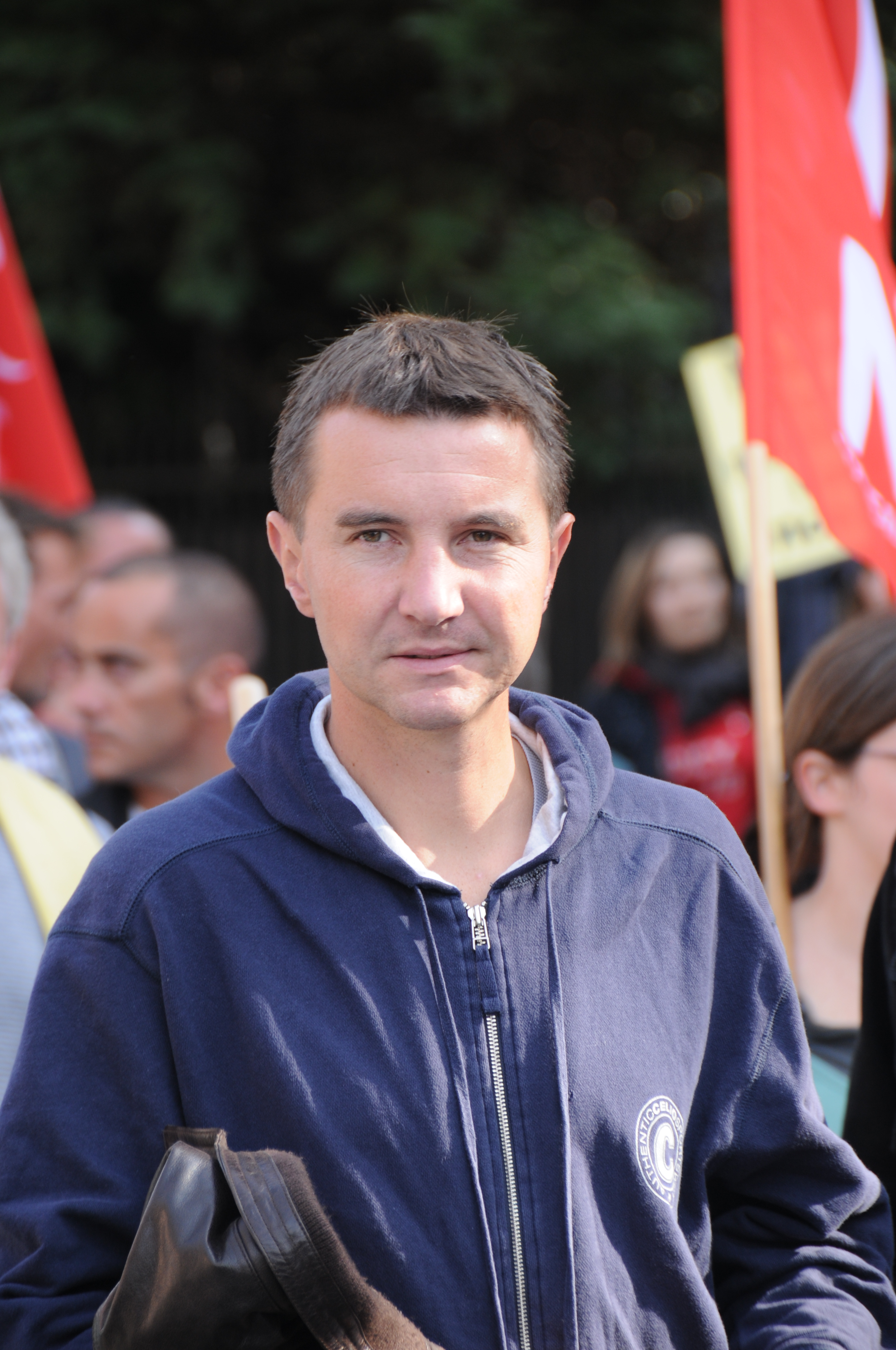 Olivier Besancenot dans le cortège du NPA arrivant au rassemblement pour la fermeture de la centrale nucléaire de Fessenheim.